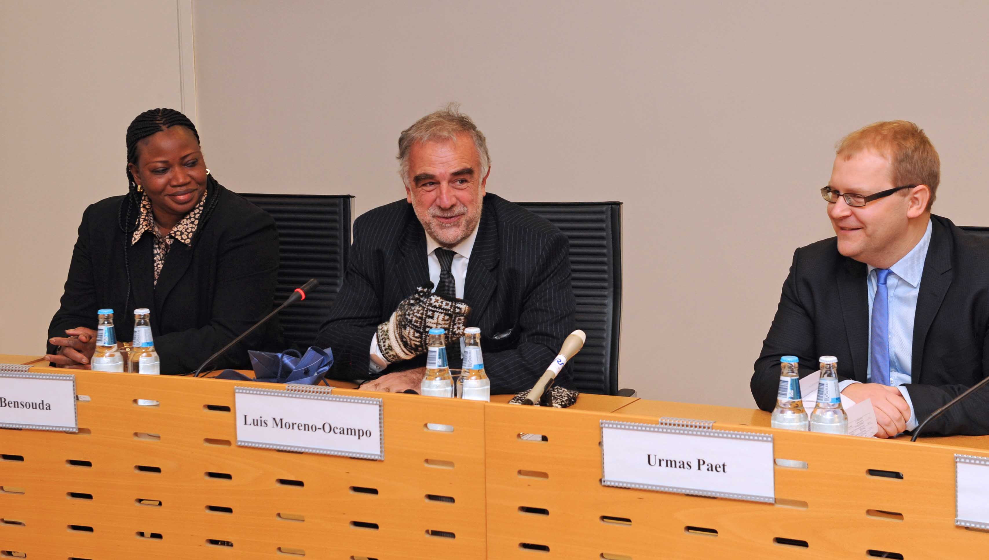 Vasakult paremale rahvusvahelise kriminaalkohtu (International Criminal Court, ICC) juunist 2012 peaprokuröri ametisse asuv Fatou Bensouda, praegune ICC peaprokurör Luis Moreno-Ocampo ja Eesti välisminister Urmas Paet